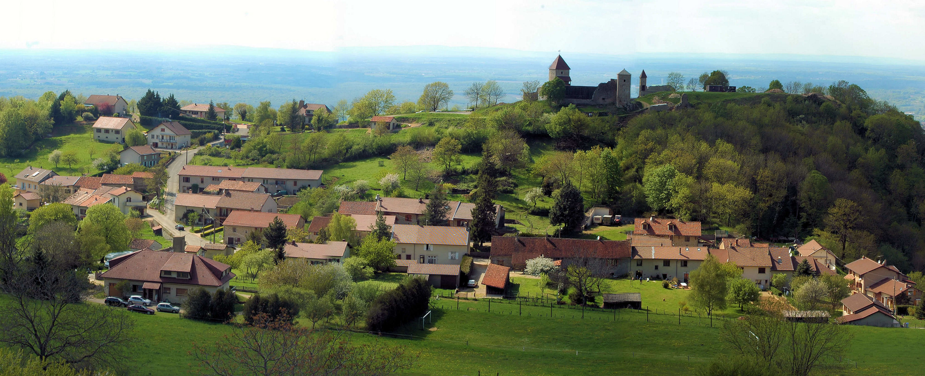 Chevreaux (Jura)